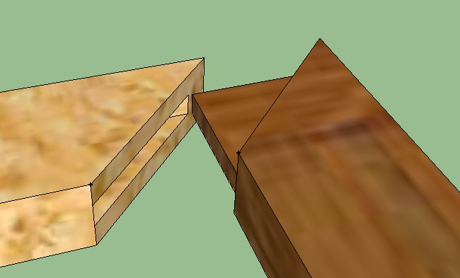 45°-os sarokillesztés